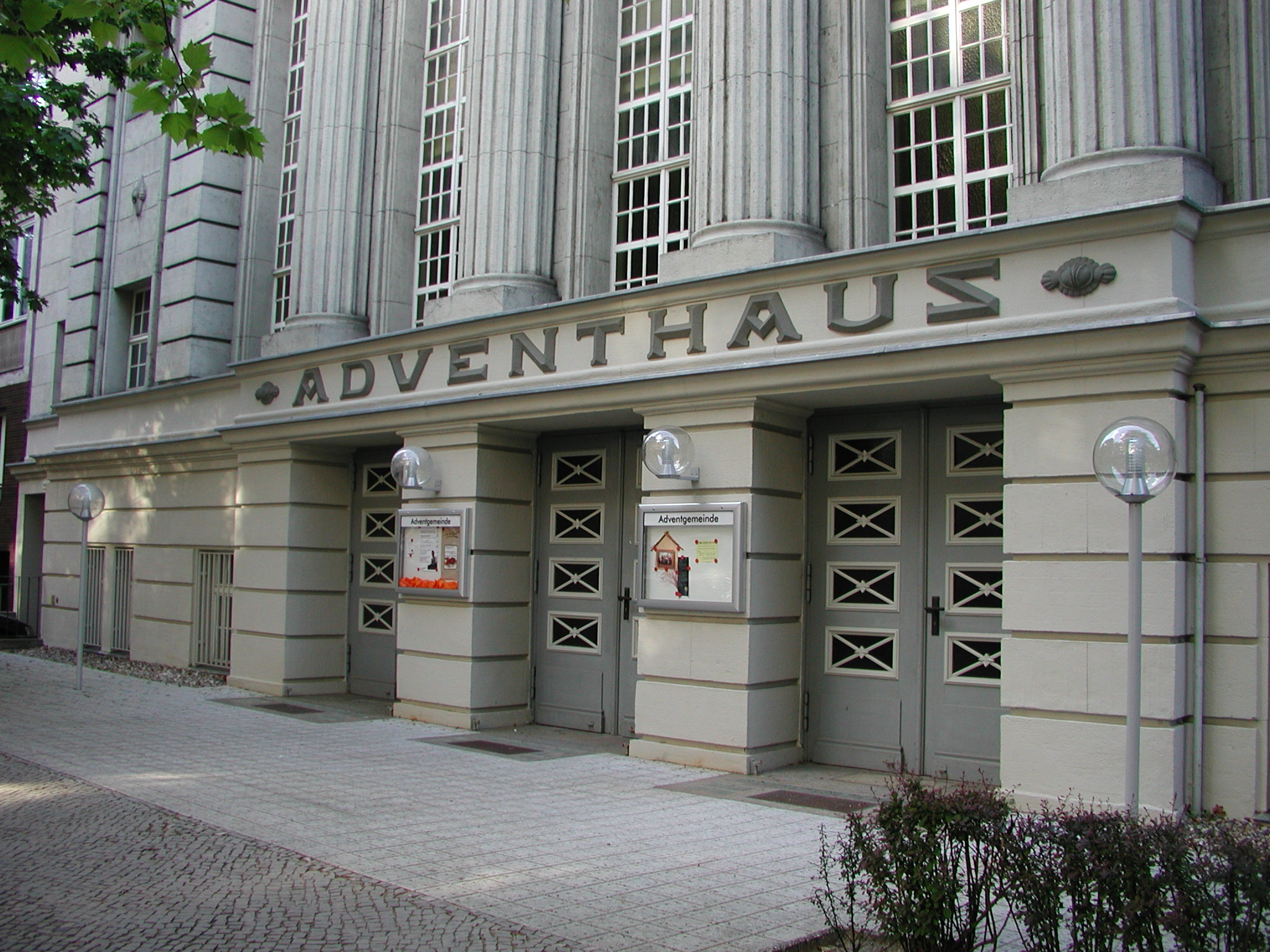 Das Adventistenhaus in Wilmersdorf